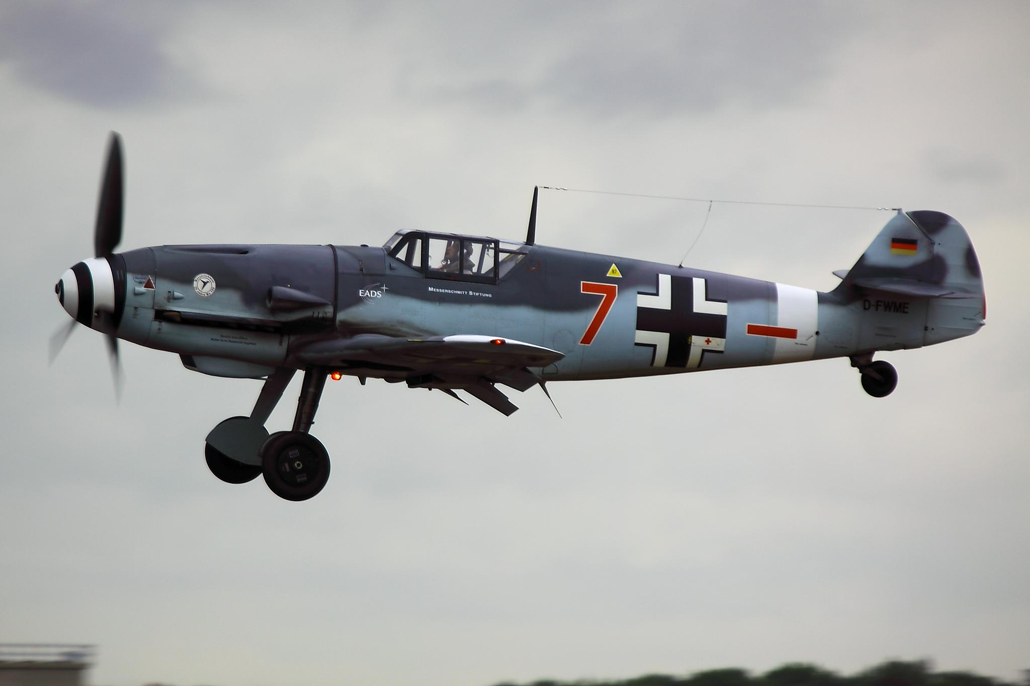 BF109 - RIAT 2010